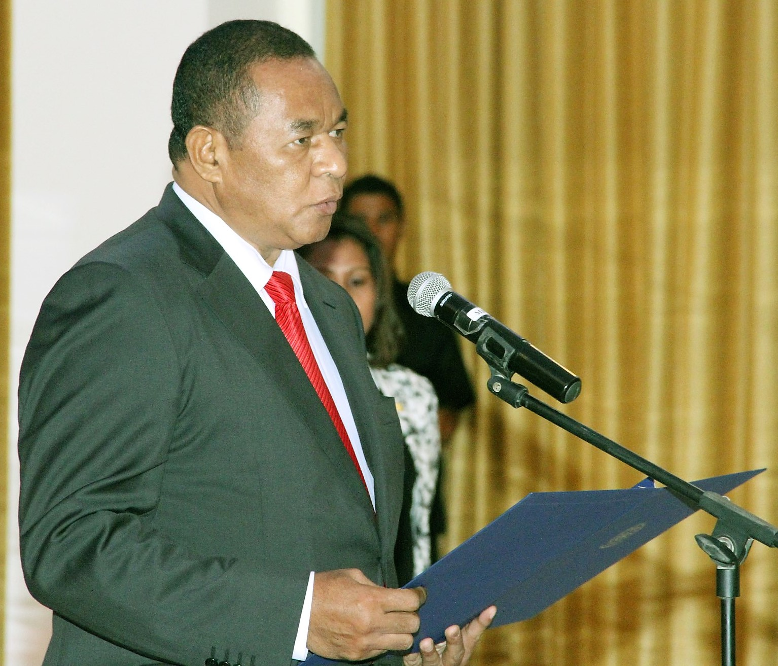 Bendito Freitas, osttimoresischer Botschafter in China erhält seine Akkreditierung von Präsident Taur Matan Ruak